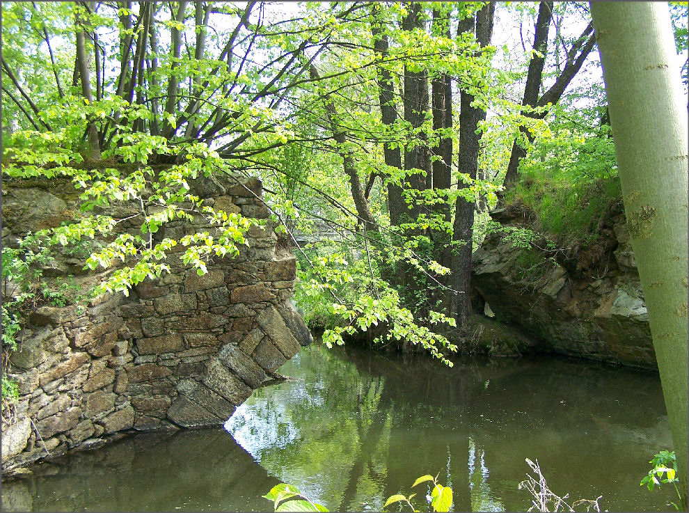 Niedergurig, alte Brücke